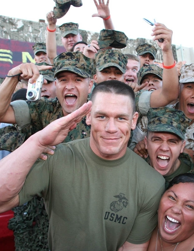 WWE Champion John Cena poses with Marines at Camp Pendleton at the premiere of his new movie "The Marine".